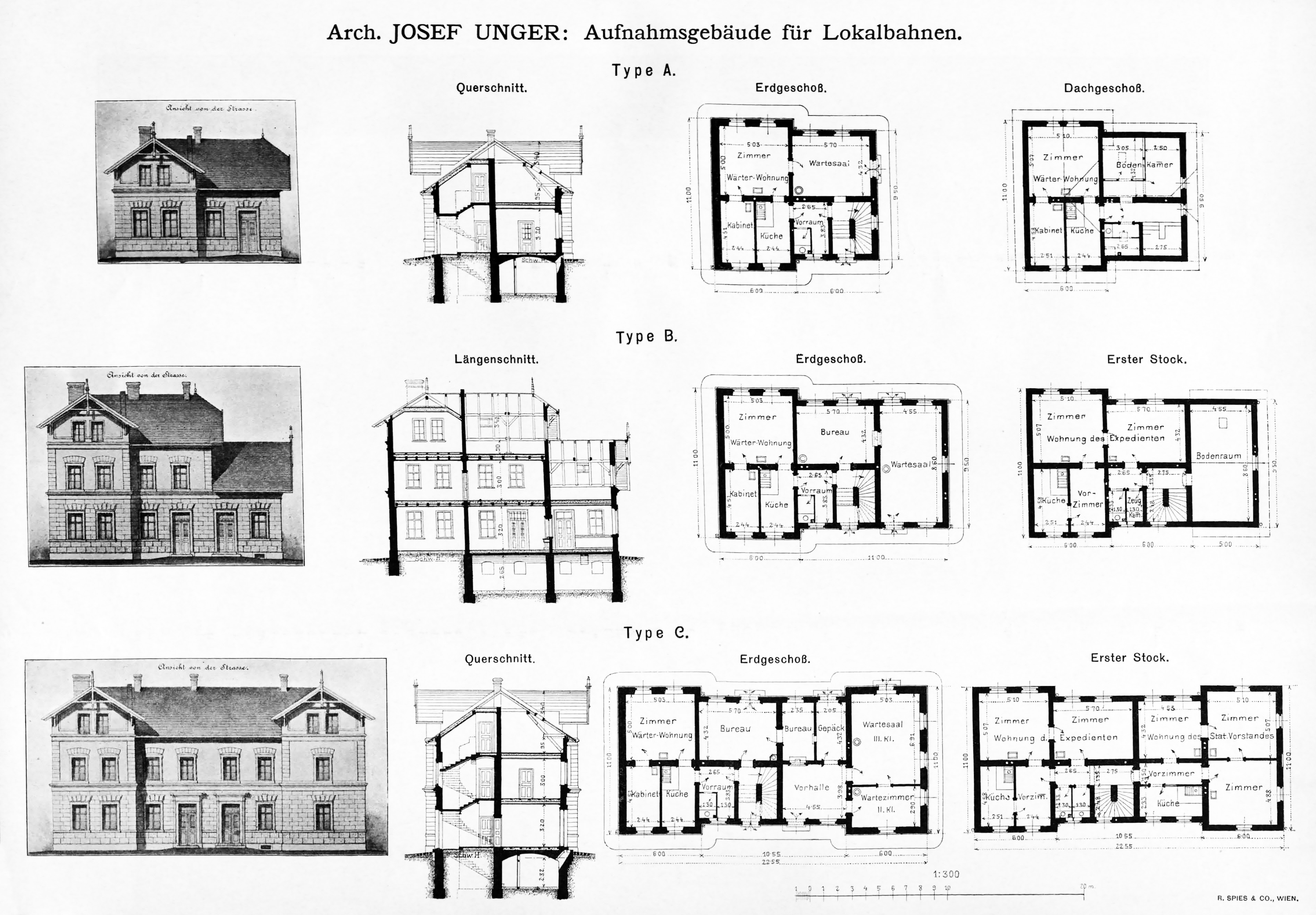 Aufnahmsgebäude für Lokalbahnen (der Österreichischen Nordwestbahn), Normalien